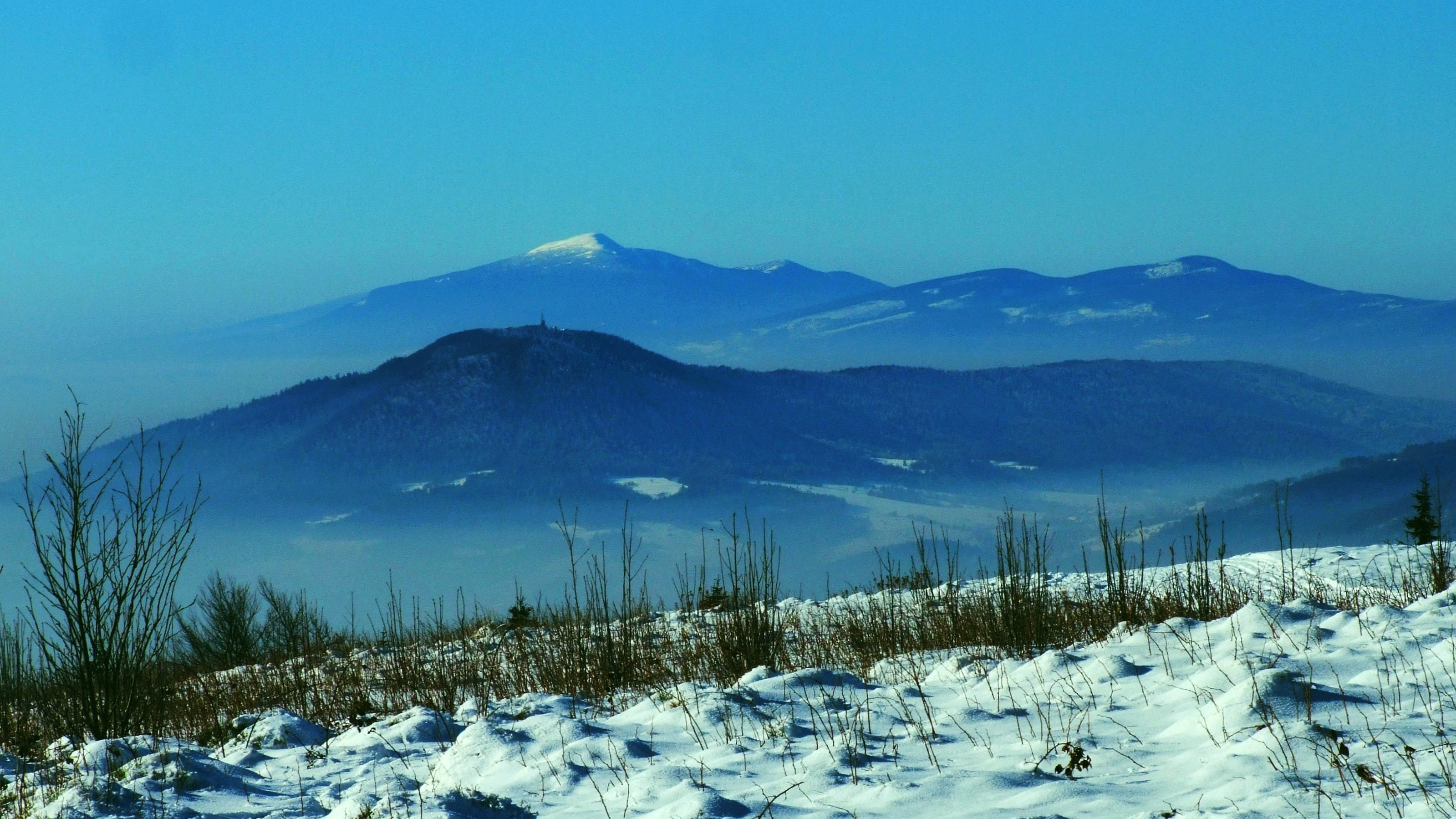 Babia Góra (z ośnieżonym szczytem), pod nią Luboń Wielki. Widok z Ćwilina